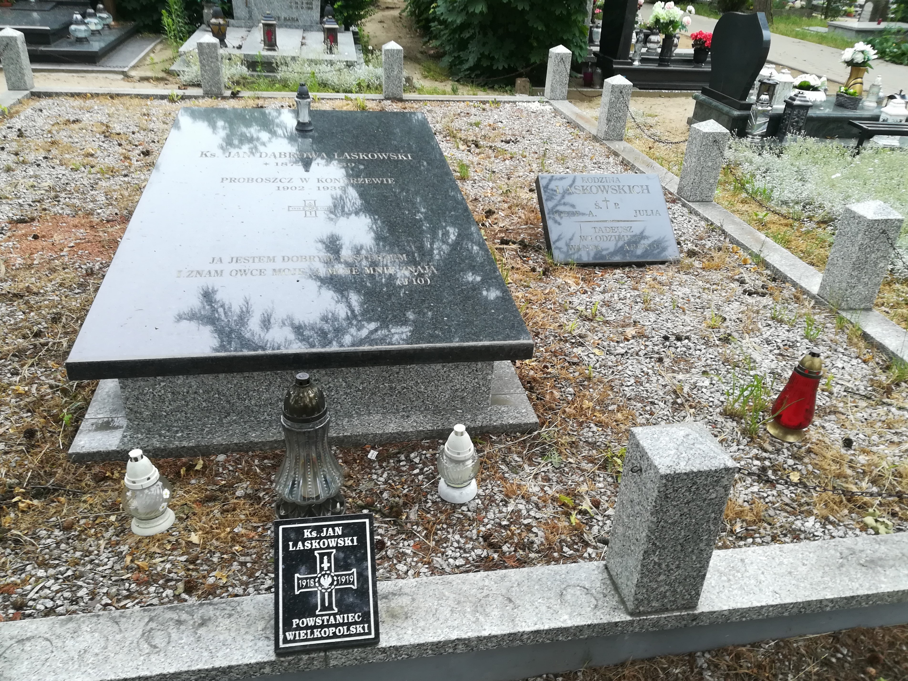 Nagrobek na cmentarzu w Konarzewie koło Poznania.